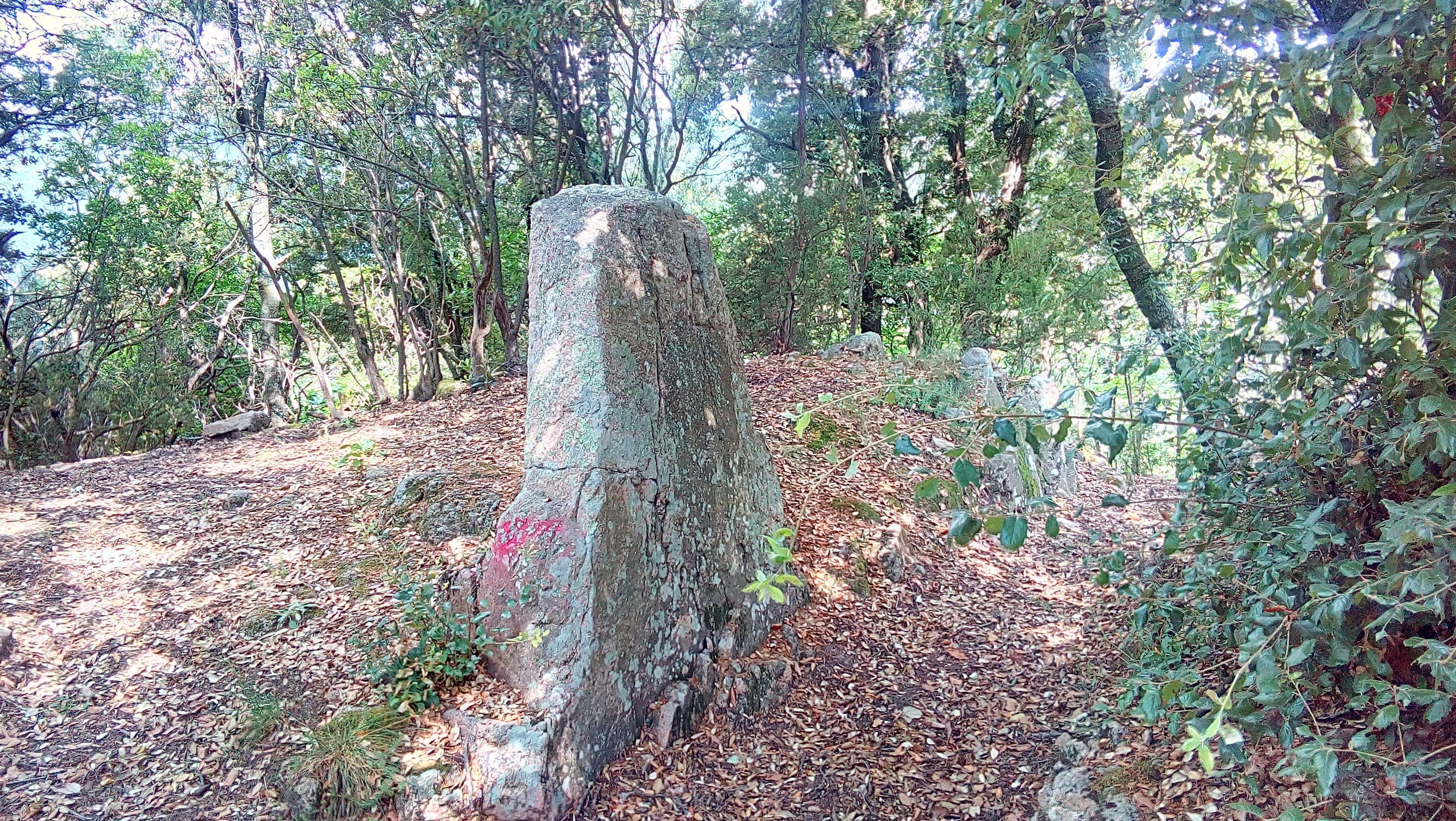 Pedra dels Evangelis, Santa Coloma de Farners - Sant Hilari Sacalm (Catalunya)